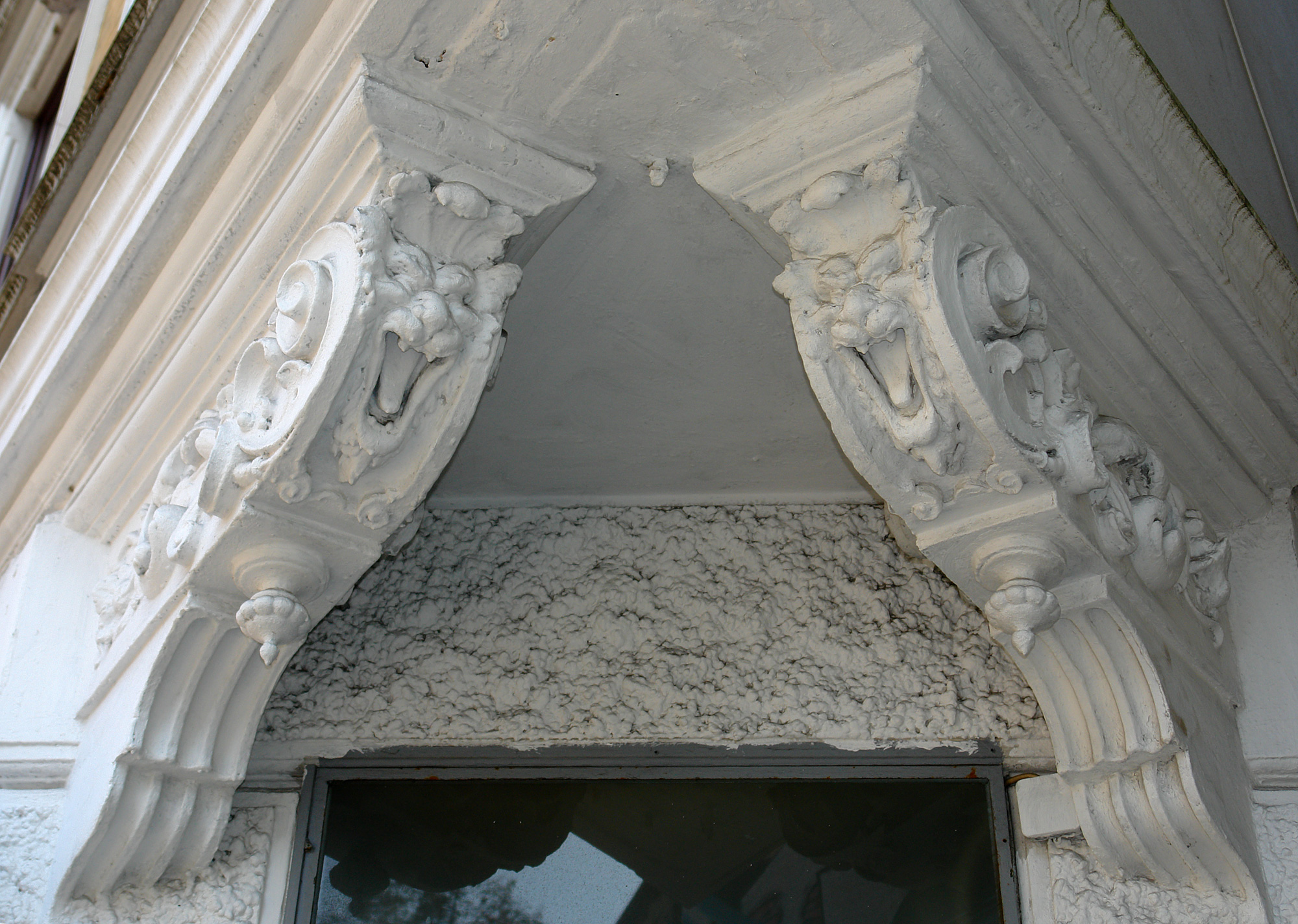 Wohnhaus (Detail am Eckeingang) in Bremen, Violenstraße 9. Das abgebildete Objekt ist ein geschütztes Kulturdenkmal in der Freien Hansestadt Bremen, mit der Nr. 1187 beim Landesamt für Denkmalpflege registriert.